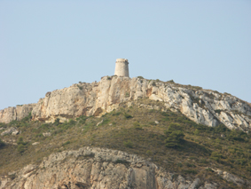 Torre de guaita del Cap d'Or (Teulada)